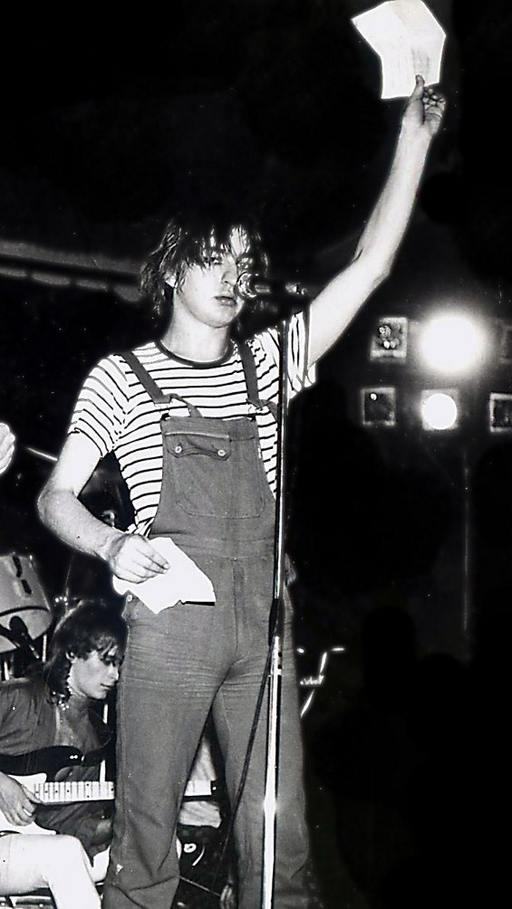 Na scenie Rock Galicji: Krzysztof Jaryczewski (Oddział Zamknięty).